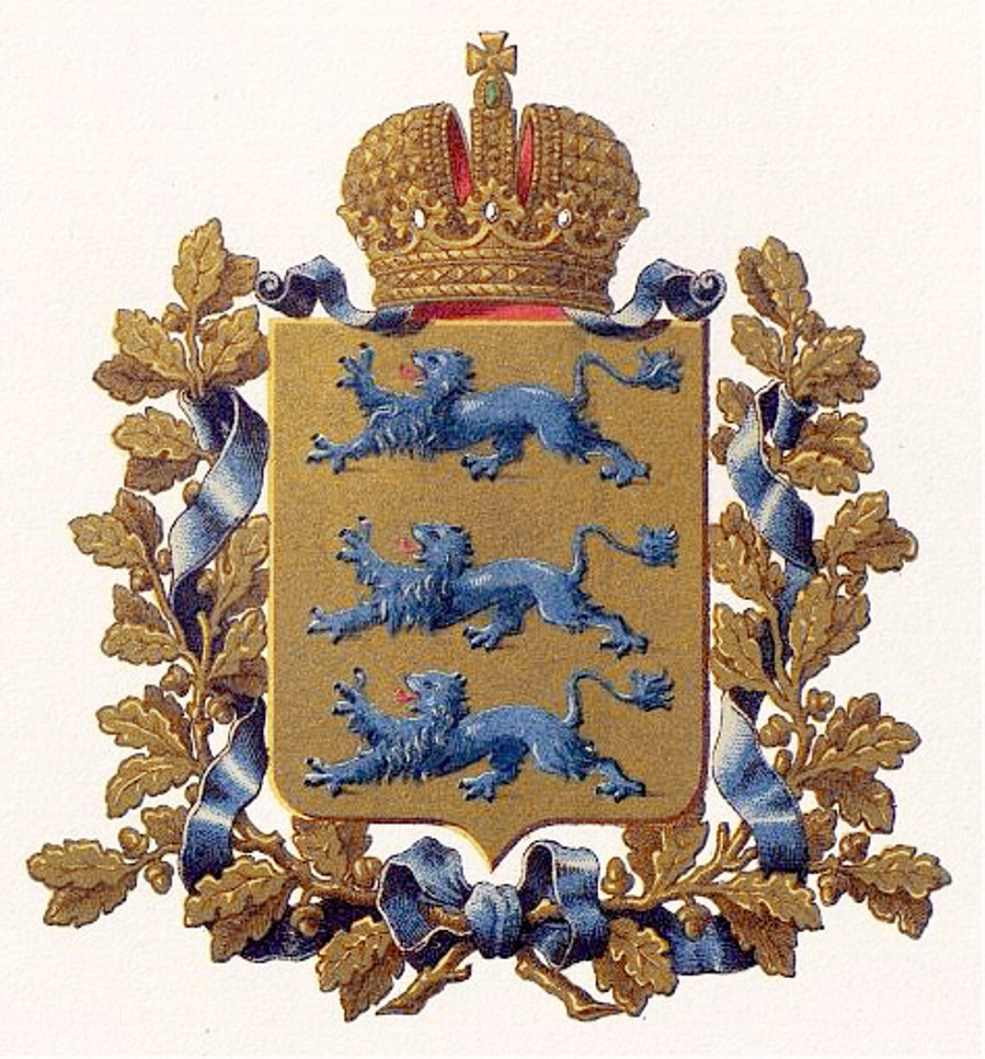 Official Russian Empire coat of arms Estlandia Governorate. Герб Российской Империи Эстляндской губернии в Гербовнике Бенке. Утверждён Императором Всероссийским Александром Вторым.